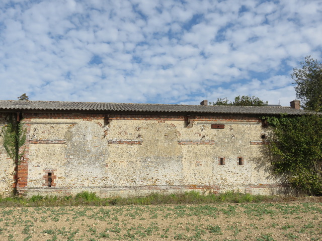 Sur ce bâtiment agricole, on distingue encore les fenêtres de l'ancienne chapelle privée du château de Tresneau démoli après la Révolution.